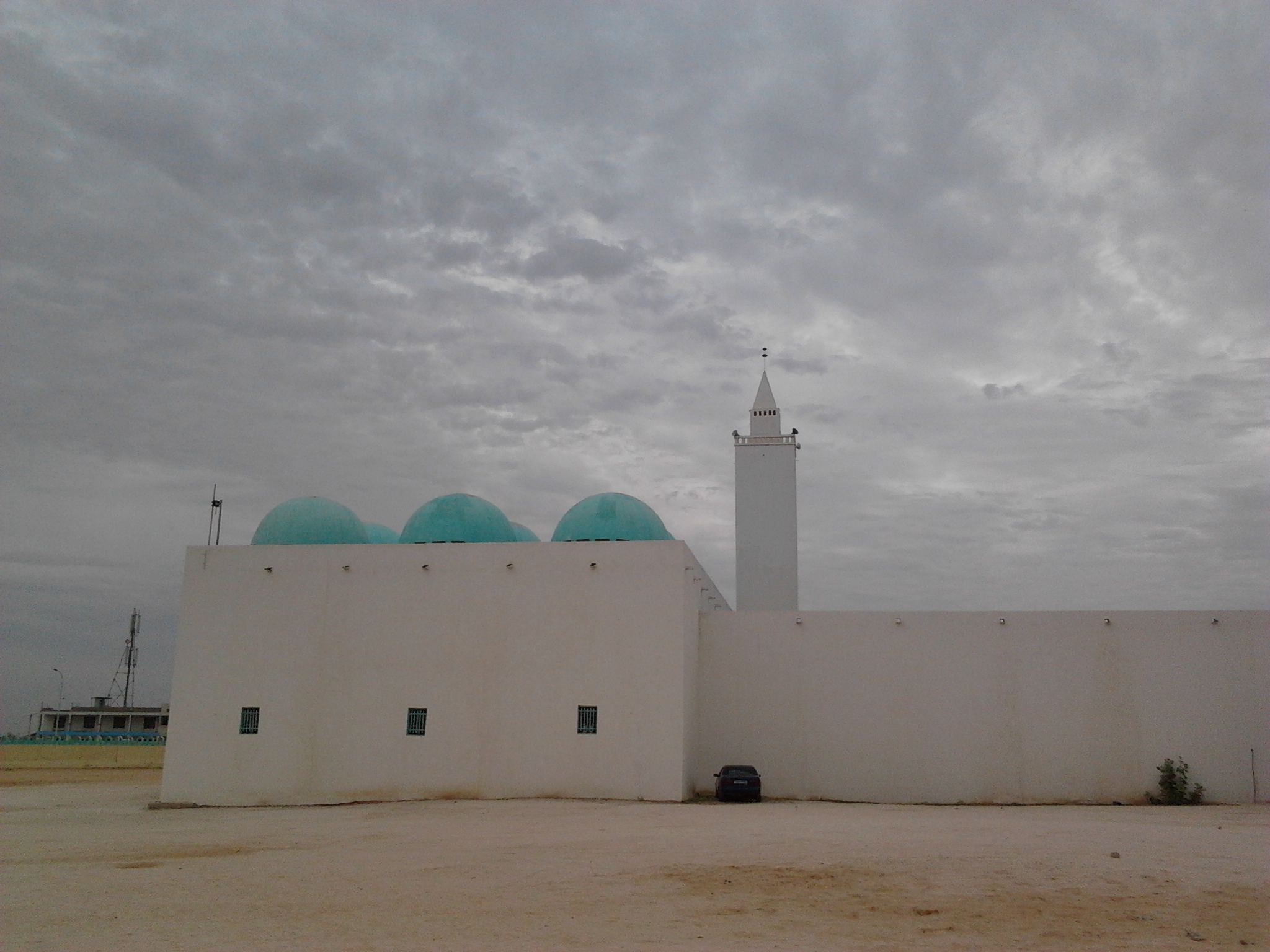 Mosquée Ibn Abbas, La Capitale, Nouakchott, Mauritanie